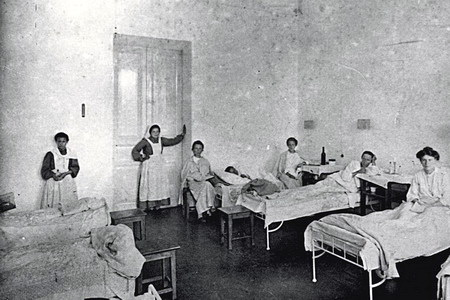 Ваныкинская больница, г. Тула. Палата №10. Фото 1908 г.